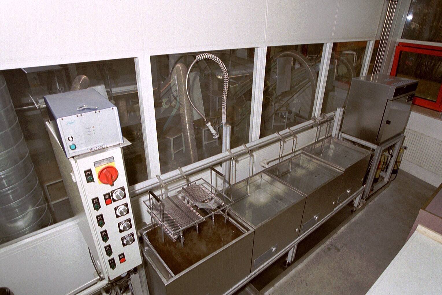 Ultraschallreinigungsanlage zum Reinigen von Chirurgieinstrumente